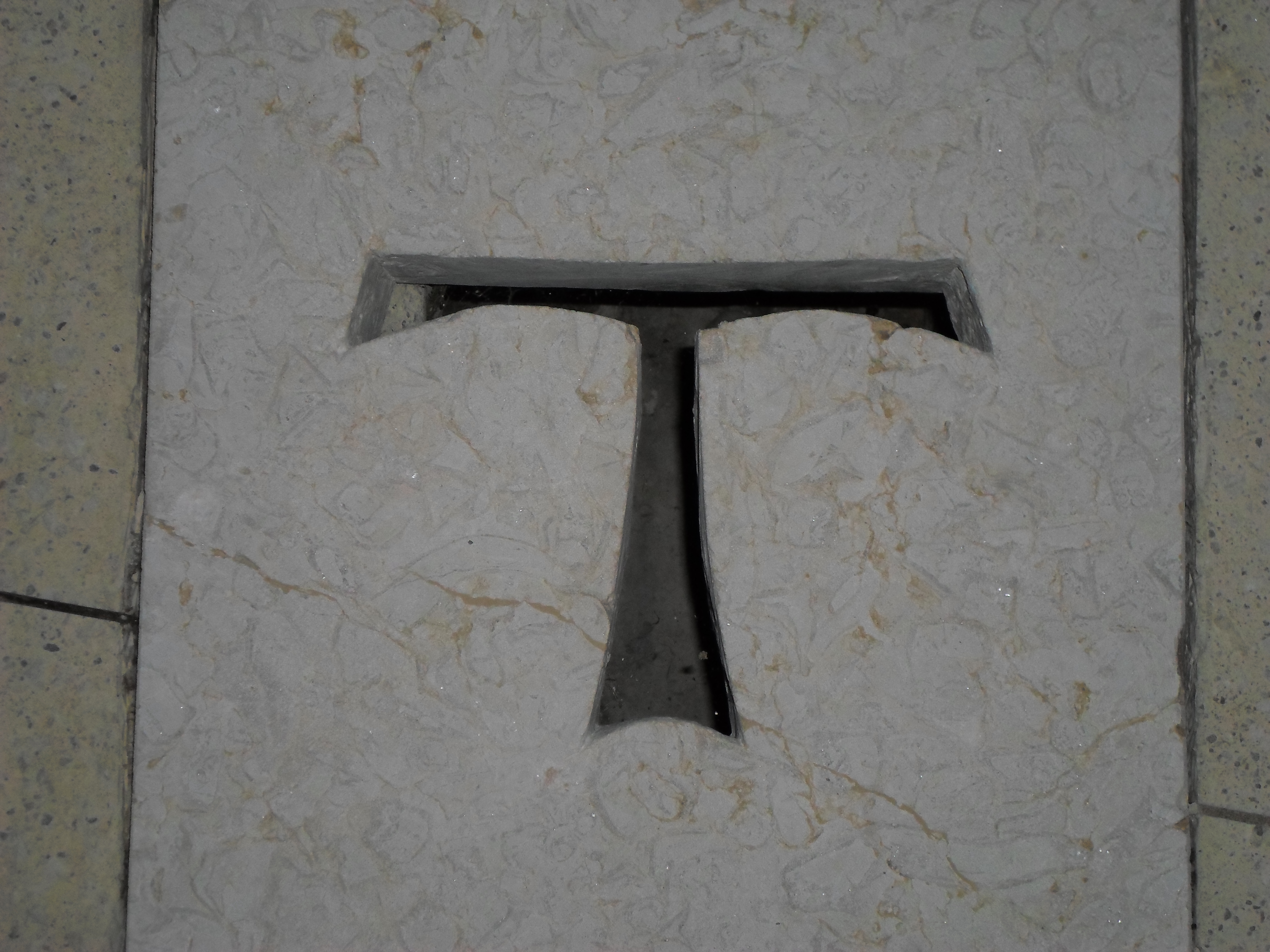 Église Notre-Dame de la Jayère Eglise Saint-Antoine-l'Abbaye by night 38160 PA38000020 VAN DEN HENDE ALAIN CC -BY-SA 4 0 050190 .